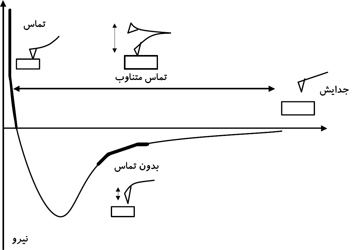 نمودار شماتیک نیرو-فاصله برای مُدهای مختلف کارکرد میکروسکوپ نیروی اتمی